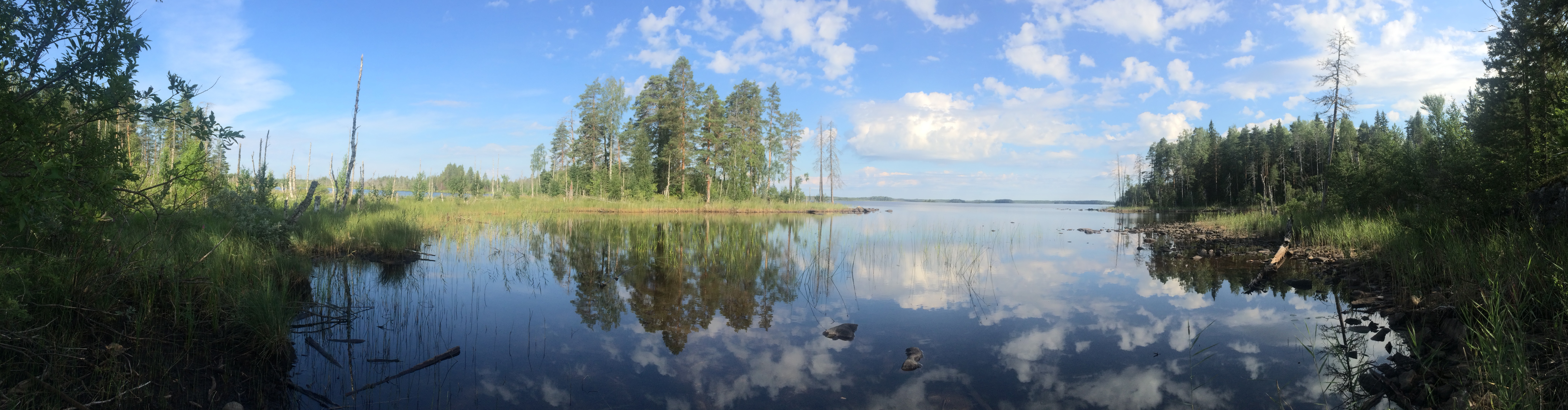 Пунозеро